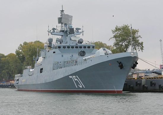 сторожевой корабль проекта 11356